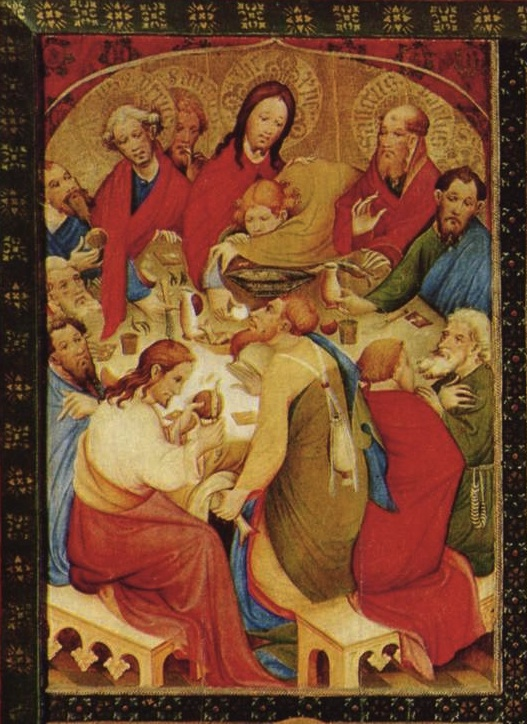 Détail du retable de Bad Wildungen